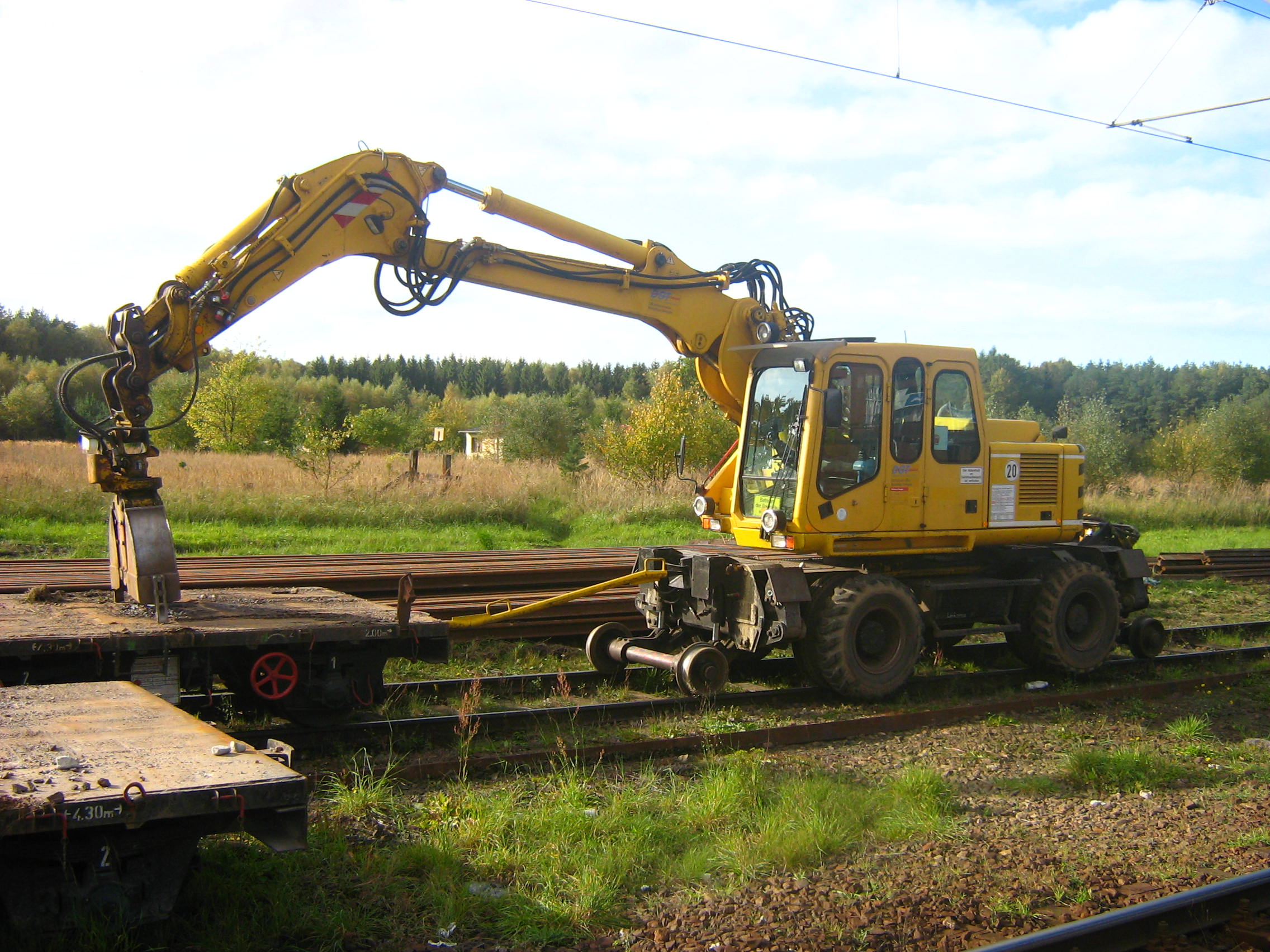 Koparko-ładowarka szynowa Kleinwagen